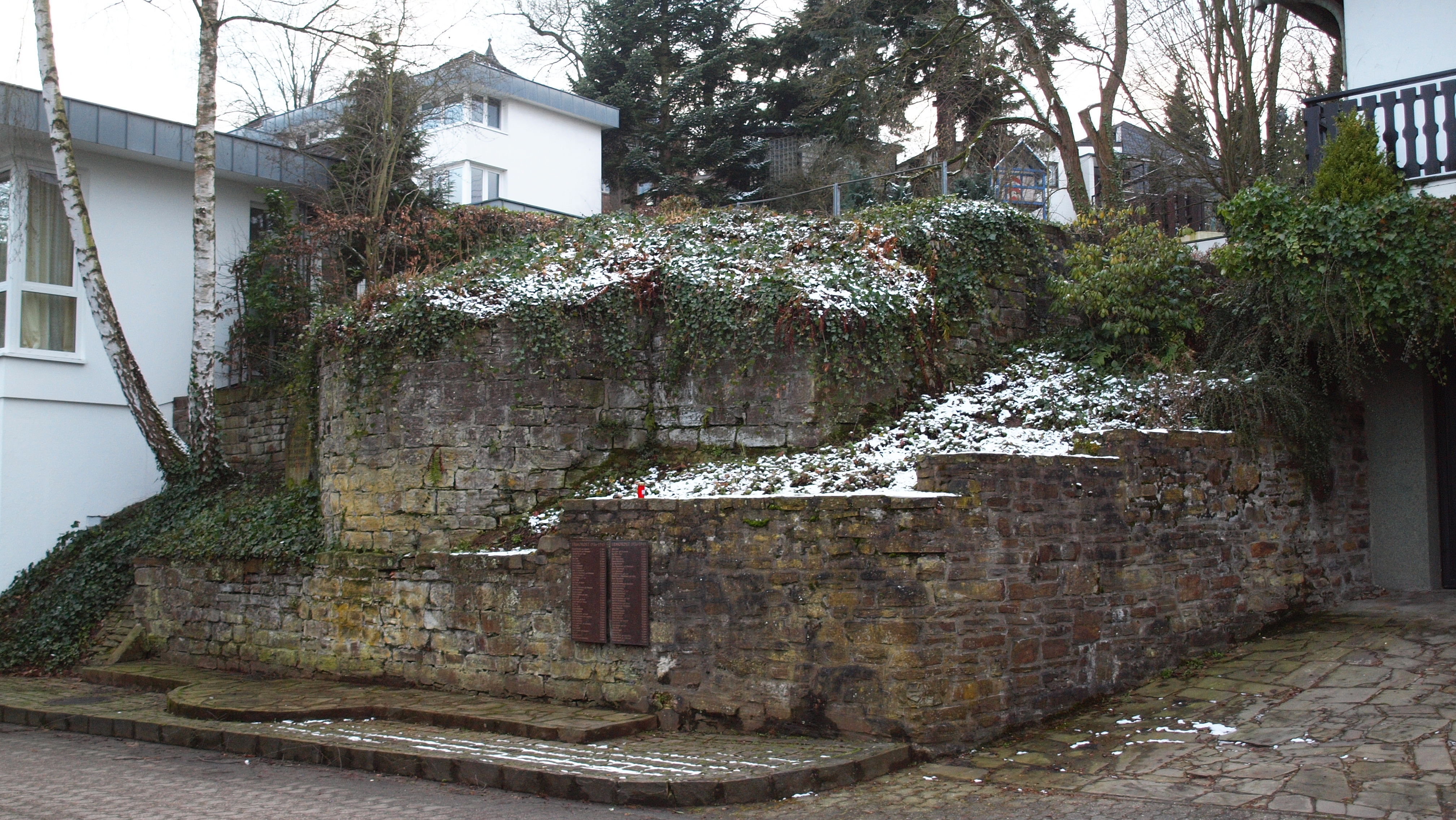 Ruine der ehemaligen Geistinger Synagoge, Sövener Straße (zwischen Nr. 5 und 9), Hennef (Sieg)